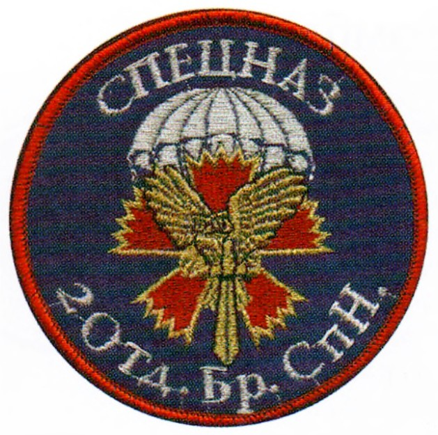 Эмблема 2-й отдельной бригады специального назначения